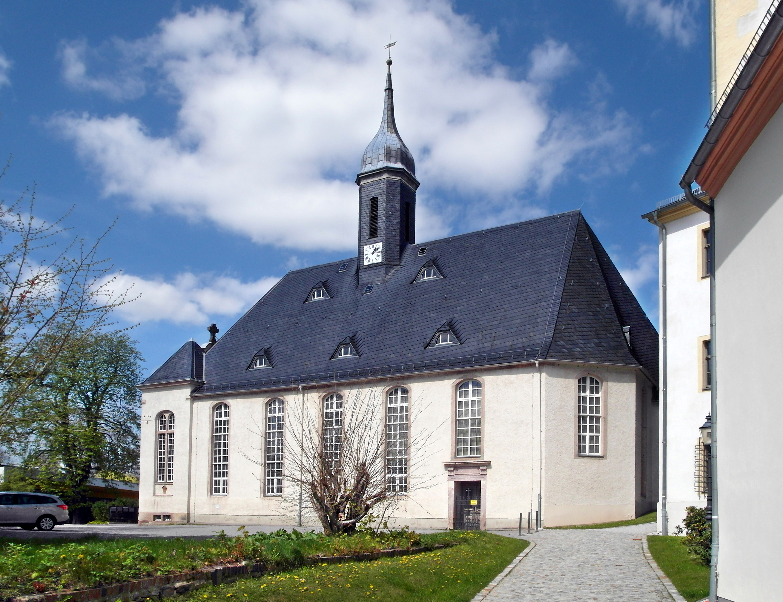 24.04.2017 09212 Limbach (Limbach-Oberfrohna): Evangelische Stadtkirche Limbach, Kirchstraße (GMP: 50.858131,12.767089). Erste Kirche 1346. Heutige Kirche nach Umbau von 1811. Sicht von Südosten. [SAM9450.JPG]20170424170DR.JPG(c)Blobelt